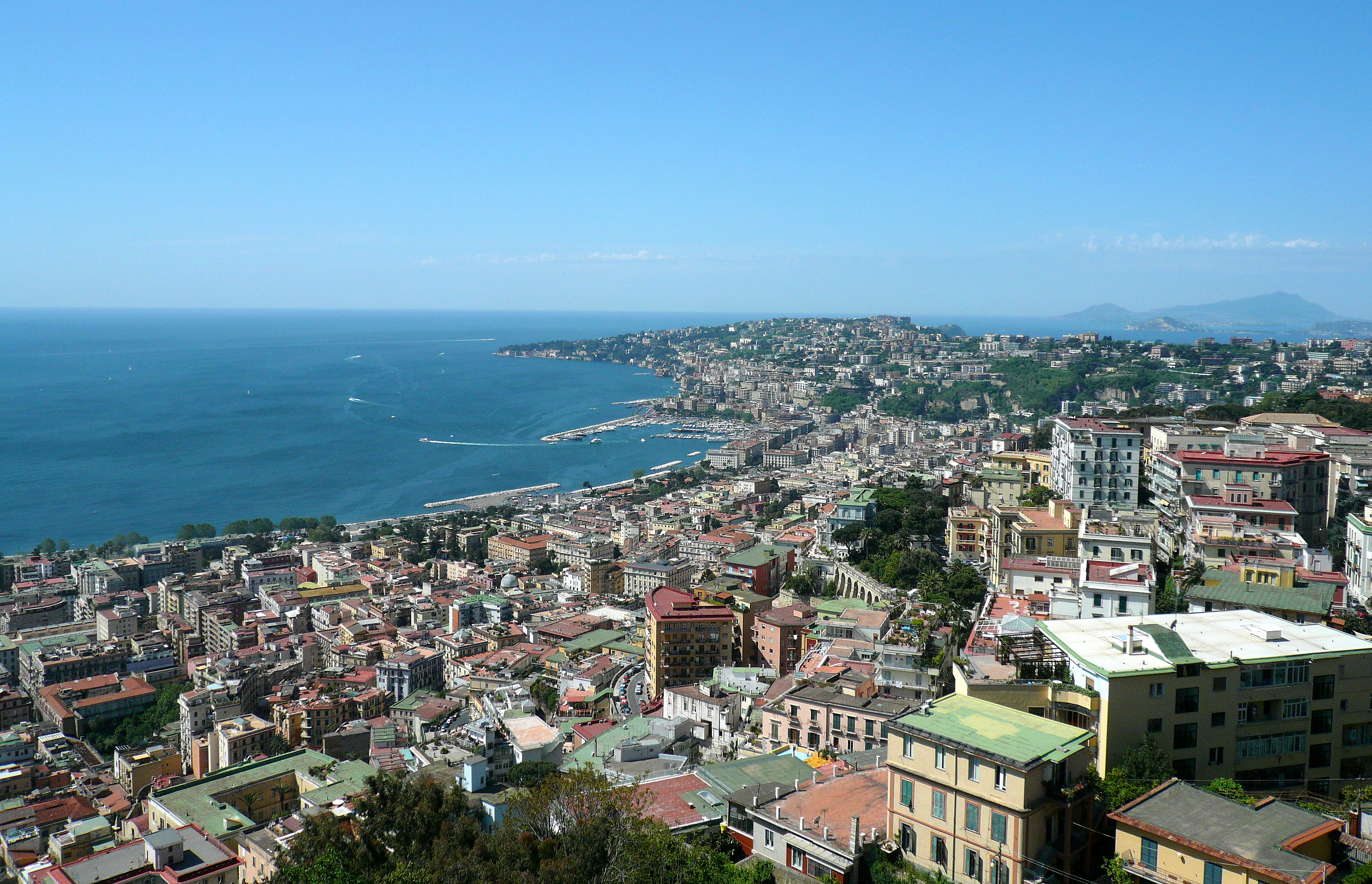 veduta da castel Sant'Elmo (Napoli) sulla zona di Mergellina e verso Posillipo. Sullo sfondo a destra il promontorio di Capo Miseno e dietro ancora le isole di Procida e Ischia dominata dalla vetta del Monte Epomeo. Autore foto: Roberto De Martino